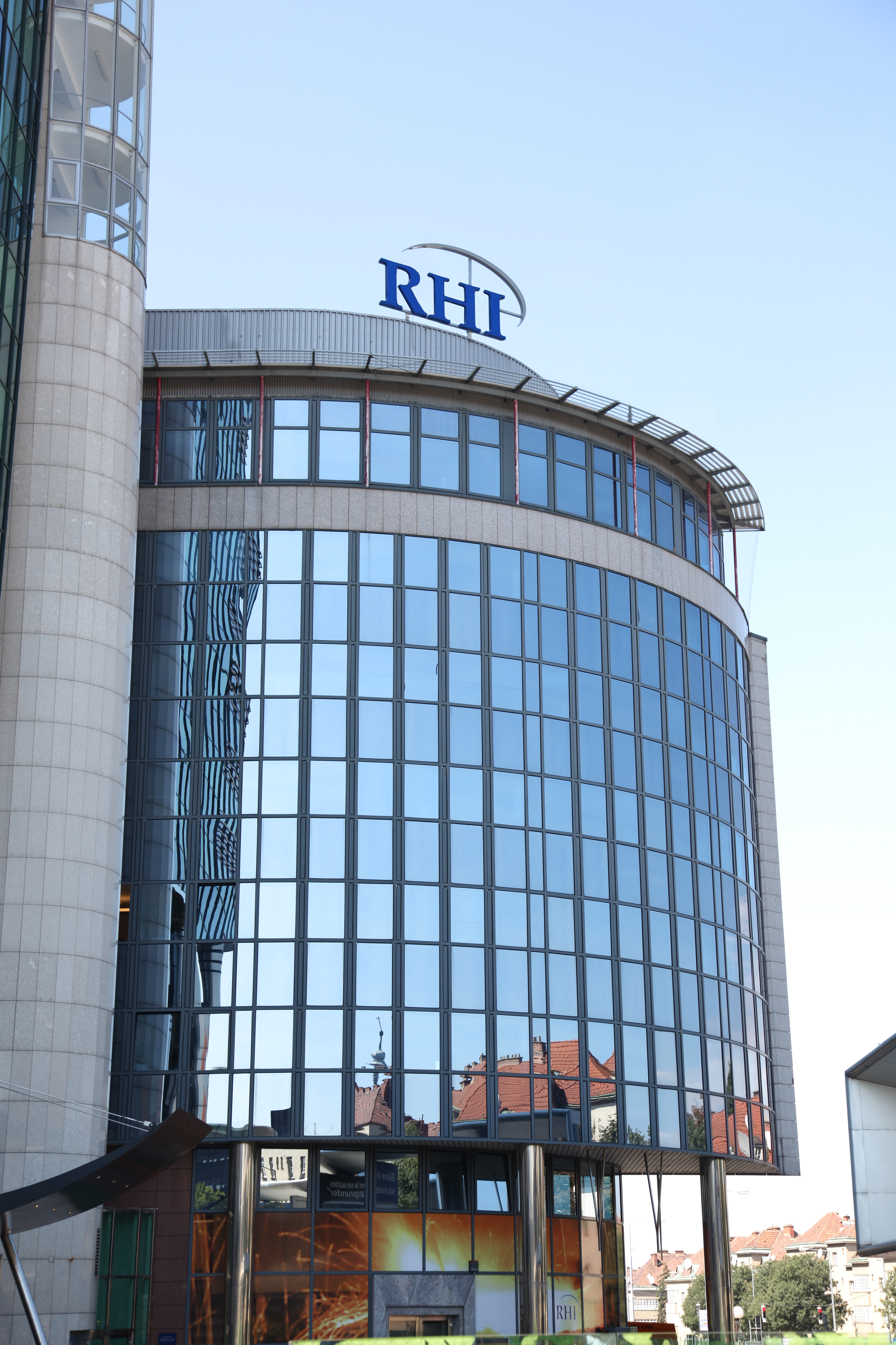 RHI Headquarters, Wien, Wienerbergstraße 9